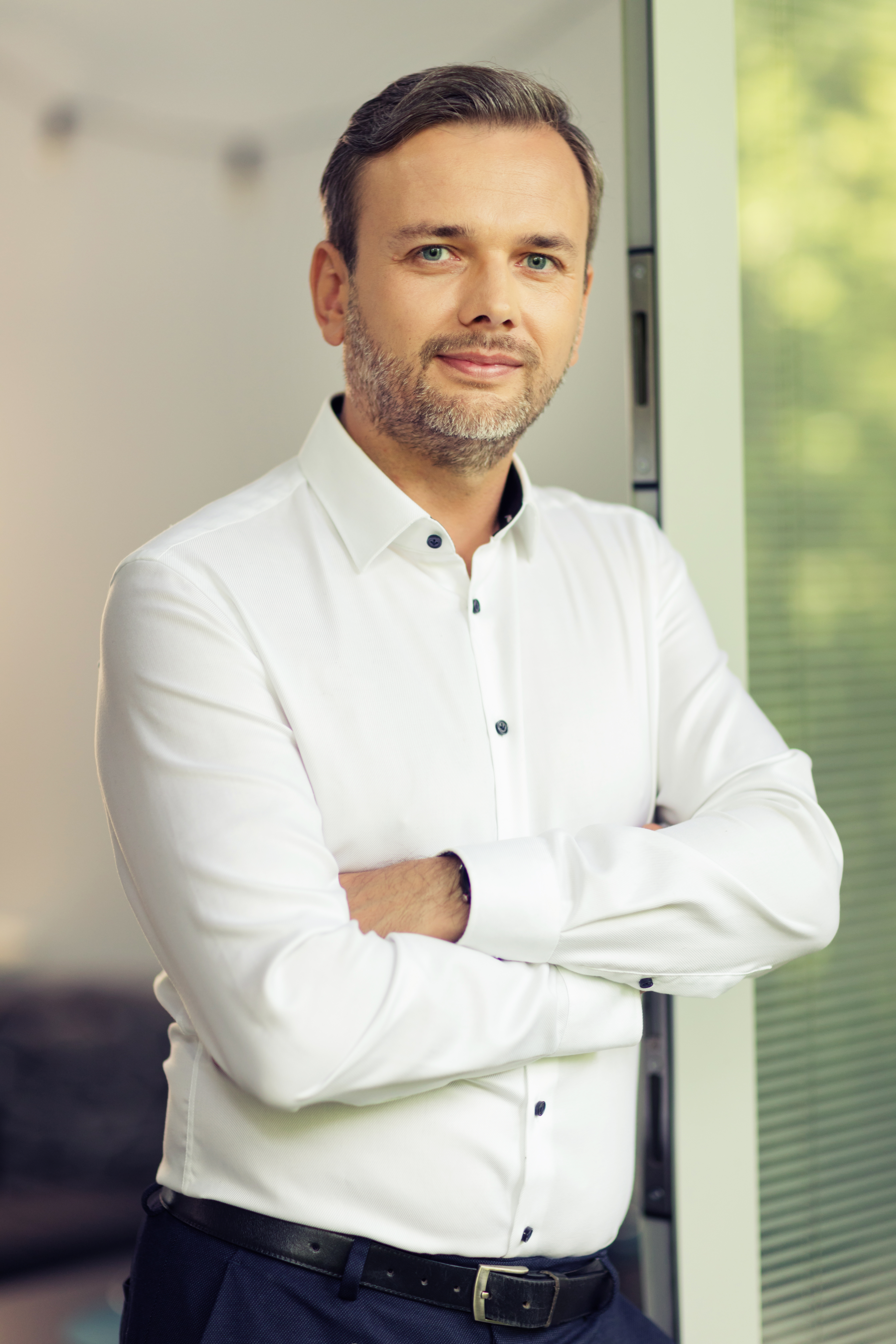 prof Grzegorz Mazurek - Rektor Akademii Leona Koźmińskiego